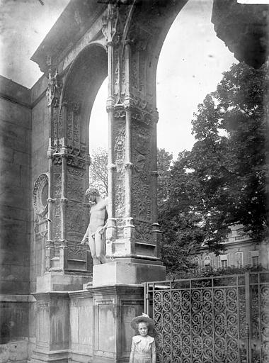 Arc de Gaillon